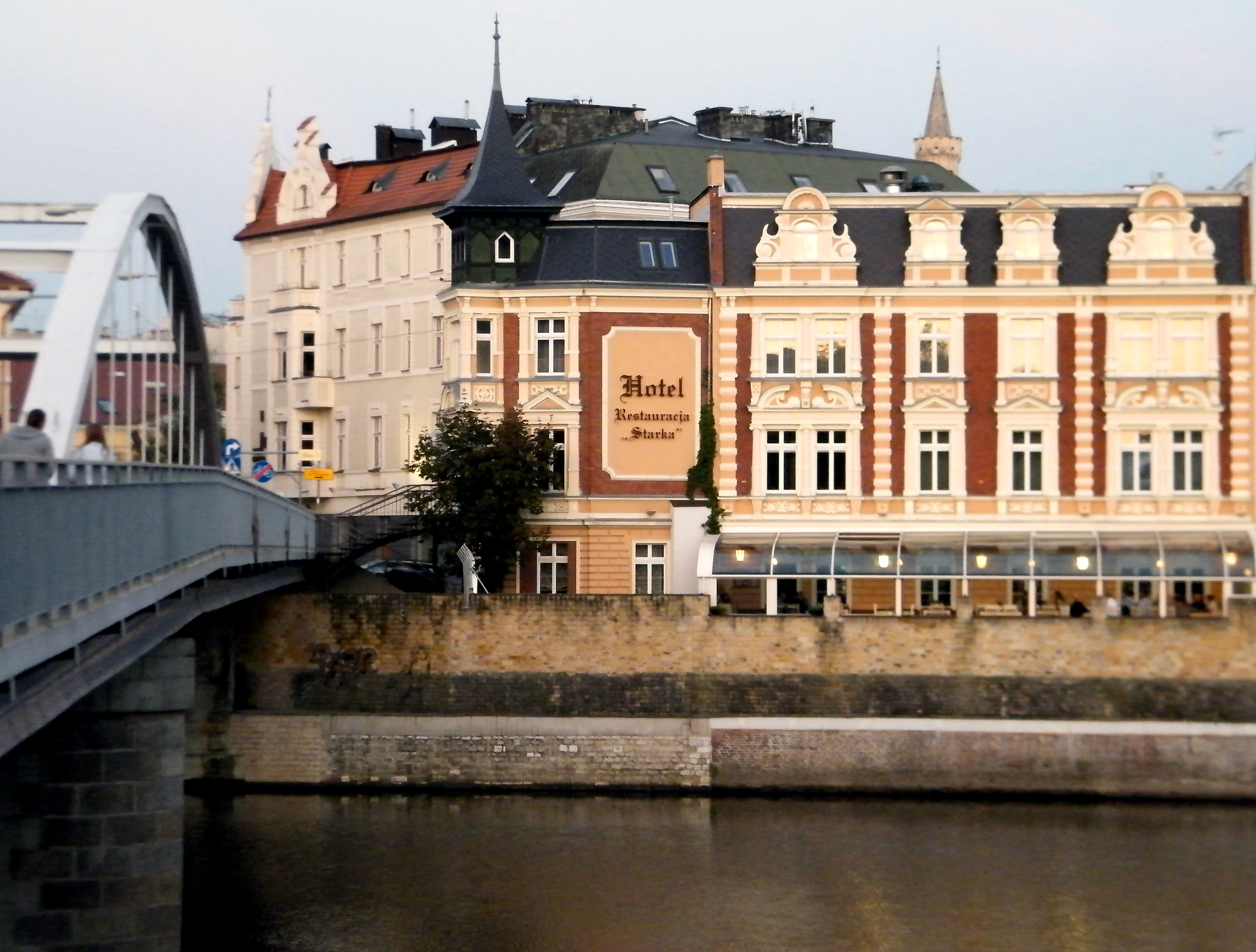 Opole, ul. Ostrówek 19 - dom, ok. 1900